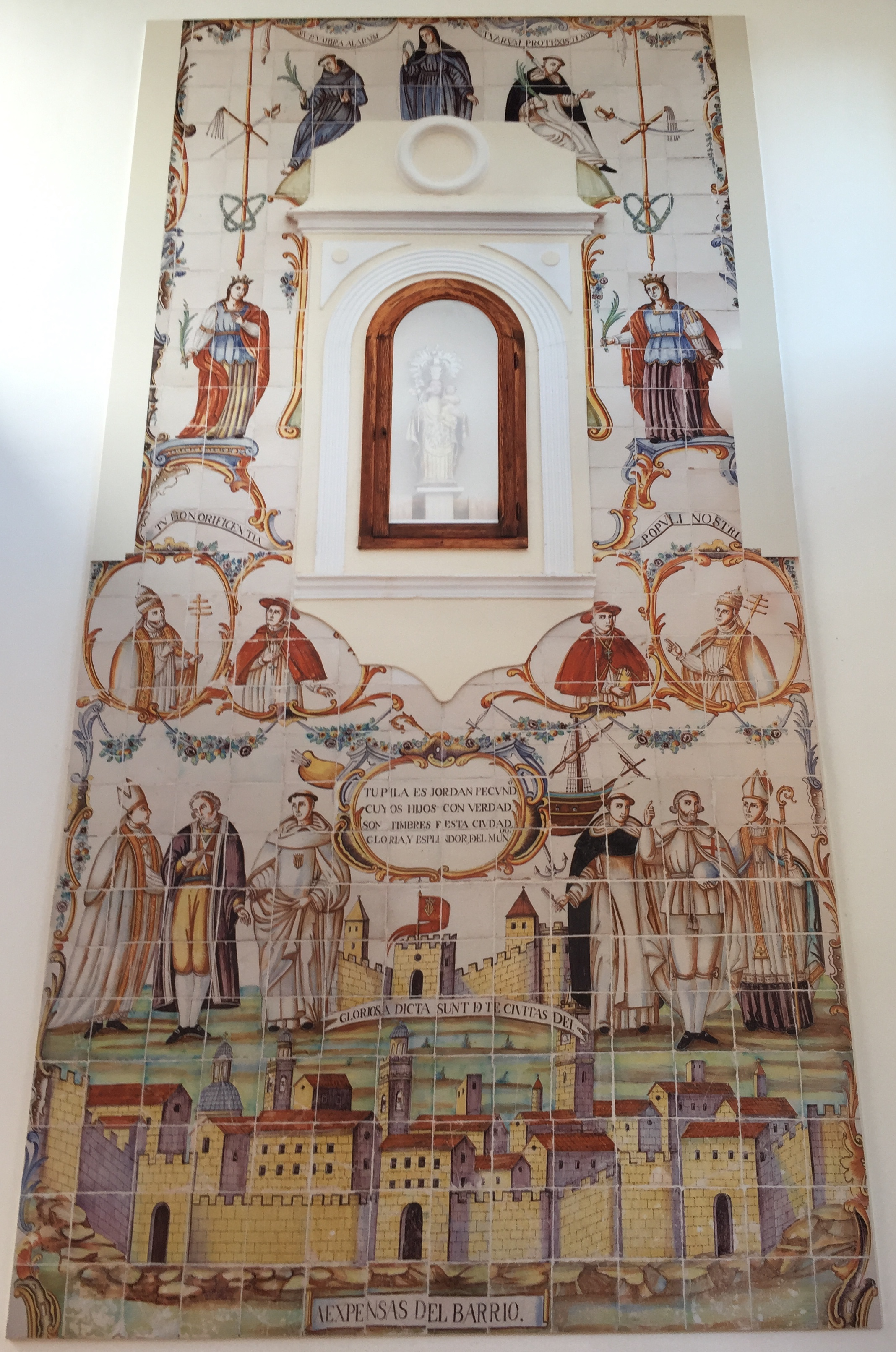 Ce retable est reproduit sur un mur de la pharmacie près de la cathédrale.